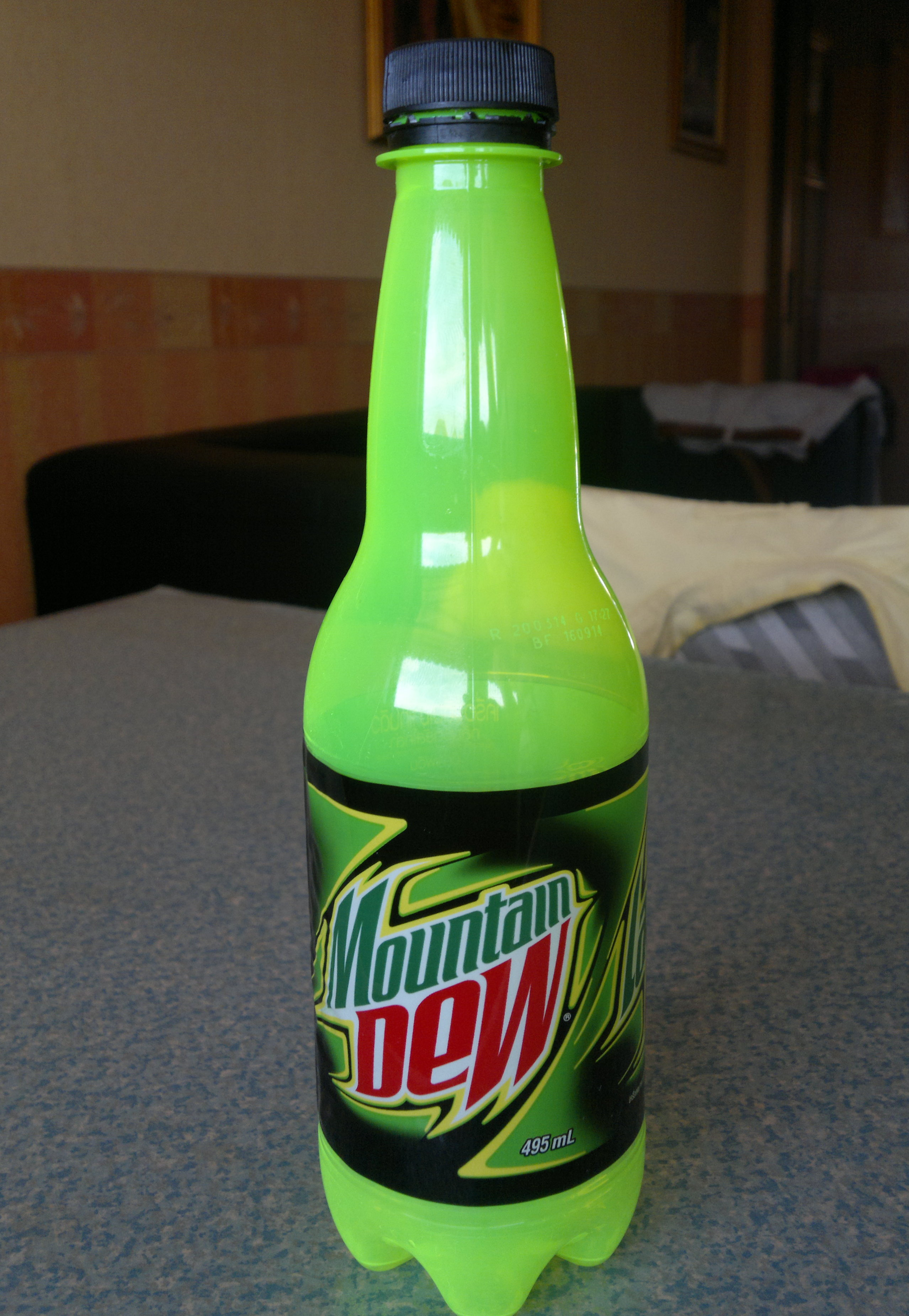 Etikett